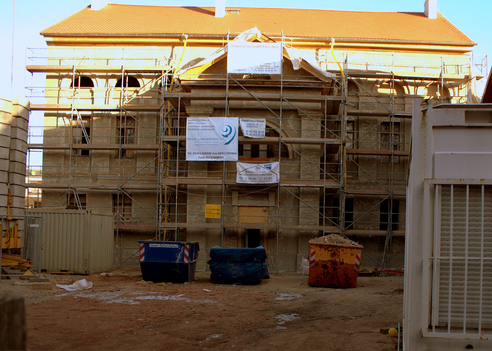 Spitalgebäude des ehem. Klosters der Barmherzigen Brüder in Köthen